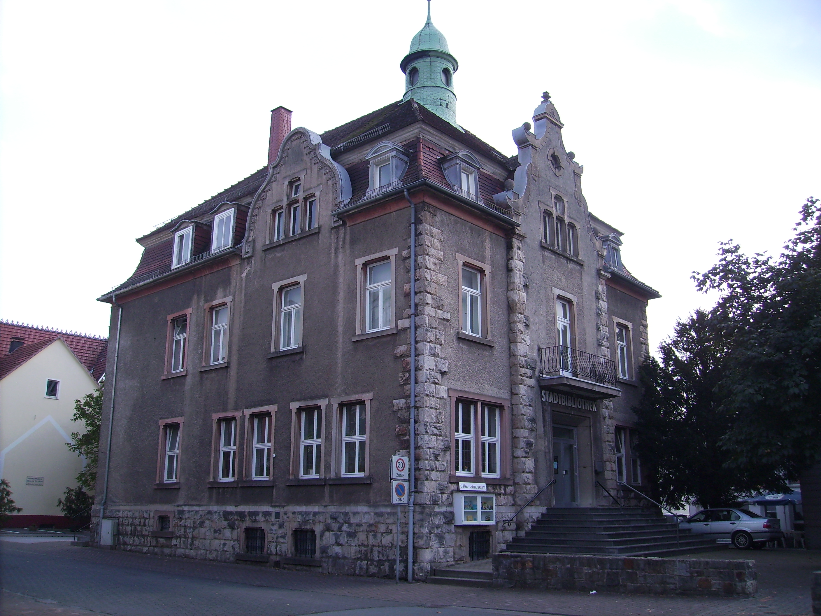 Stadtbibliothek und Heimatmuseum der Stadt Marsberg